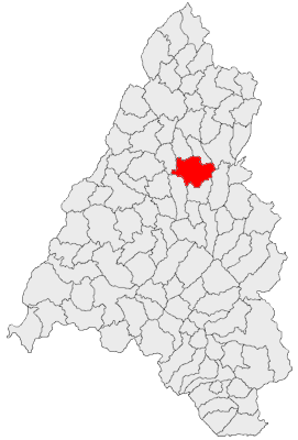 Categorie:Hărţi ale judeţului Bihor